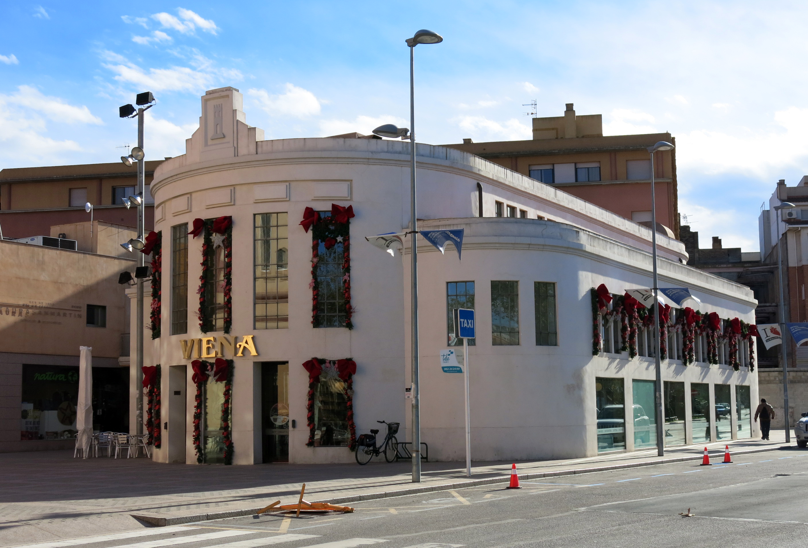 Restaurant Viena, antic Mercat del Peix, pl. Barcelona (Tortosa).